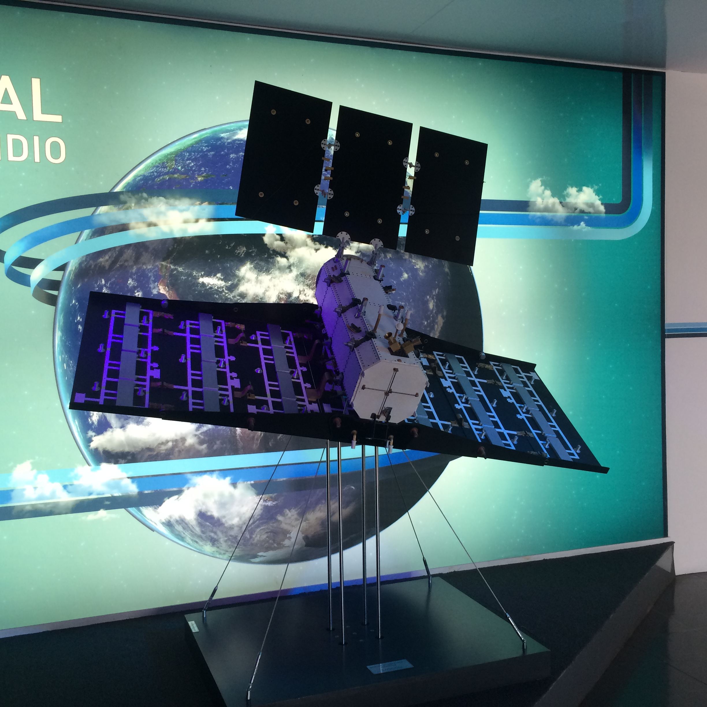 Maqueta del SAOCOM en el Polo espacial de Punta Indio